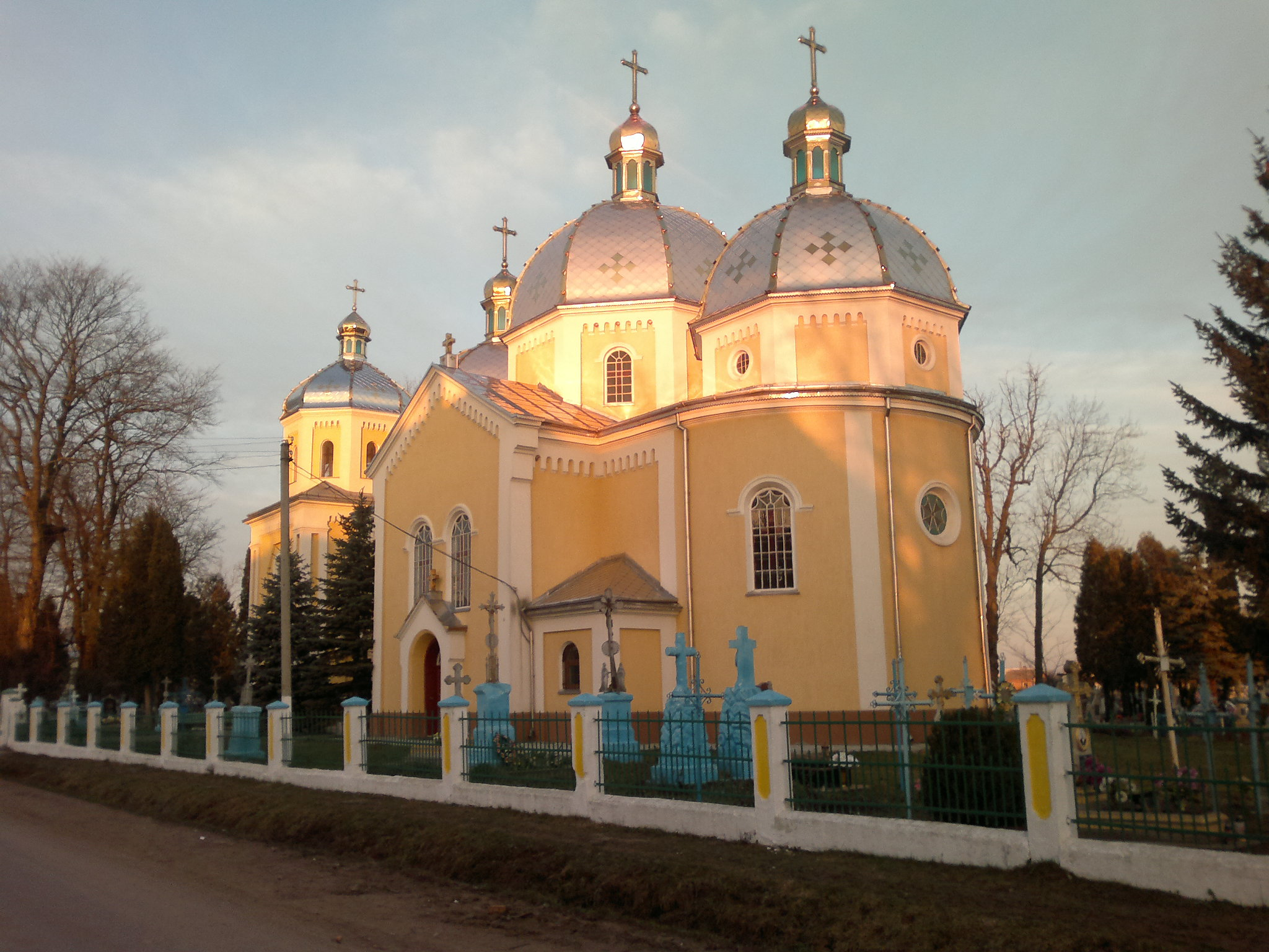 с.Бабина